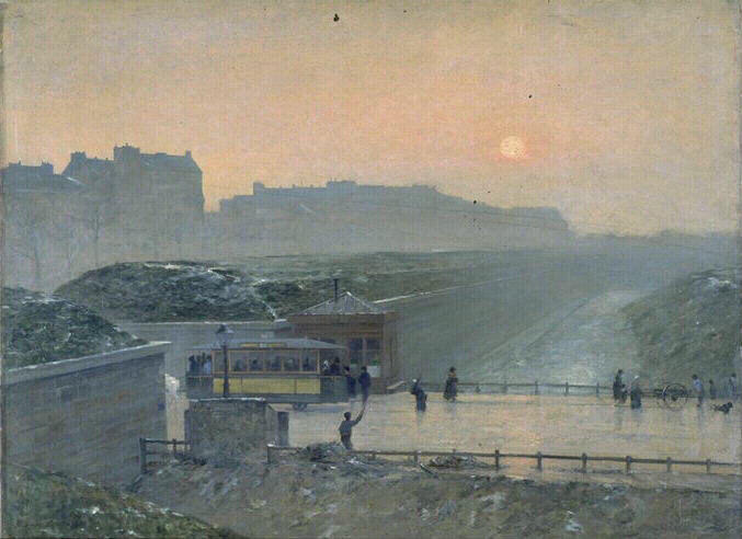 Selon la base Joconde : "Sur une route qui traverse le fossé des fortifications de Paris, un tamway est arrêté devant le bureau d'une station. Divers passants animent la scène ; des taches de neige à demi fondue blanchissent ça et là la terre, et le soleil couchant, perçant le brouillard d'une soirée d'hivers, l'éclaire de ses pâles rayons".